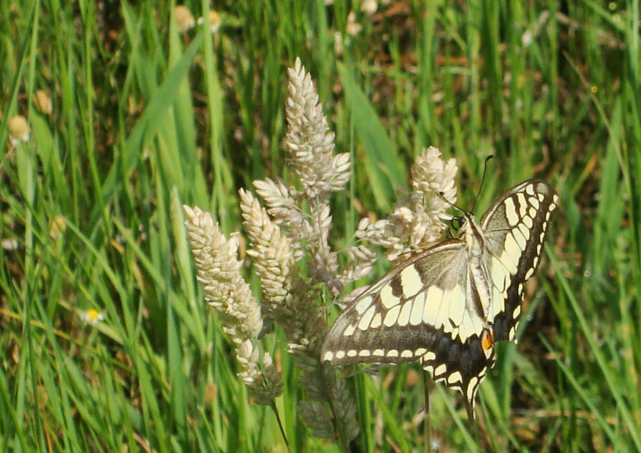 Parque Natural da Serra da Estrela This is a photography of a protected area of Portugal indexed in the World Database on Protected Areas with the ID: 1338 (WDPA)